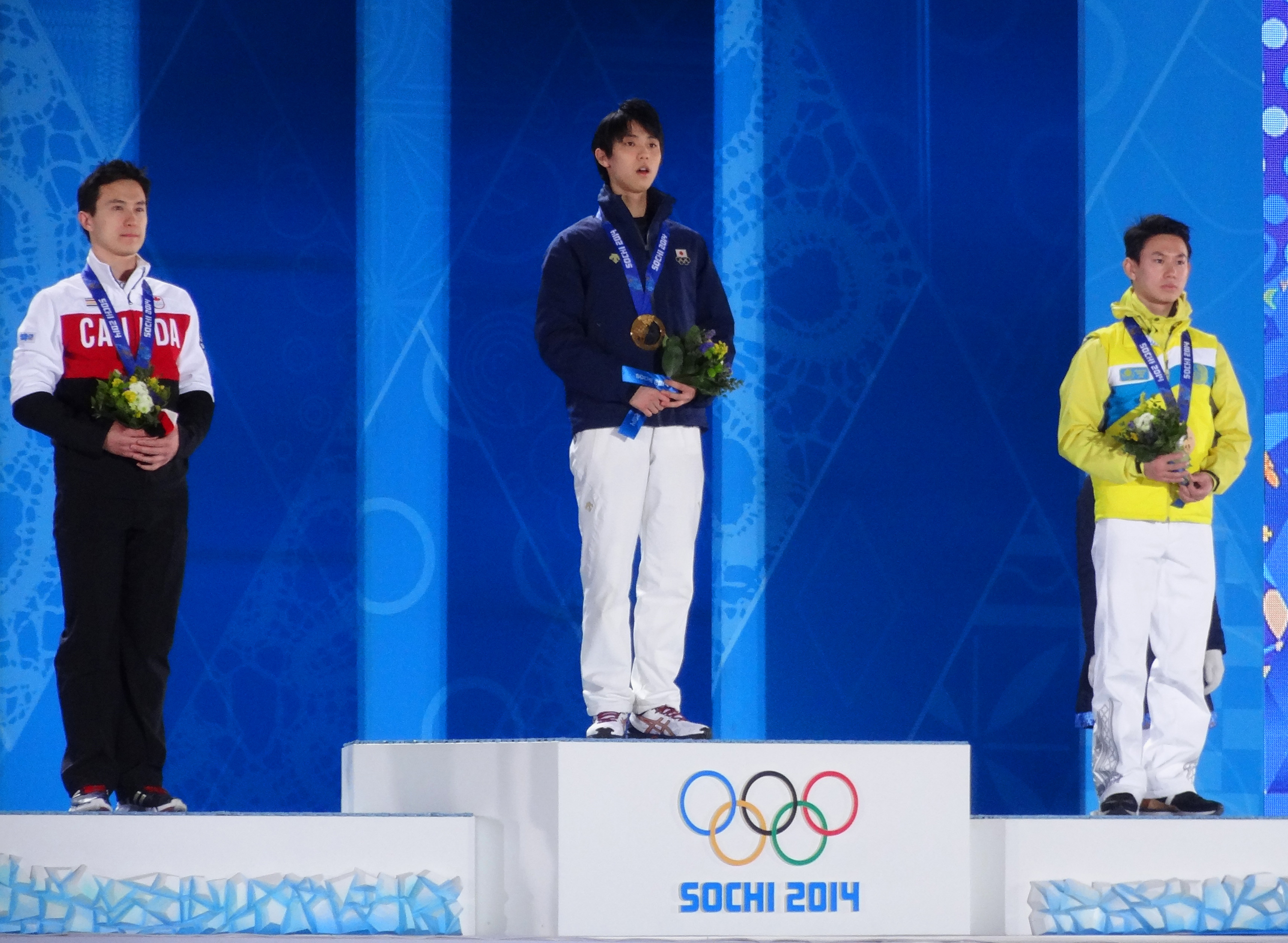 Церемония награждения. Мужчины: одиночное катание. Юдзуру Ханю (JPN), Патрик Чан (CAN), Денис Тен (KAZ). Сочи, 2014.